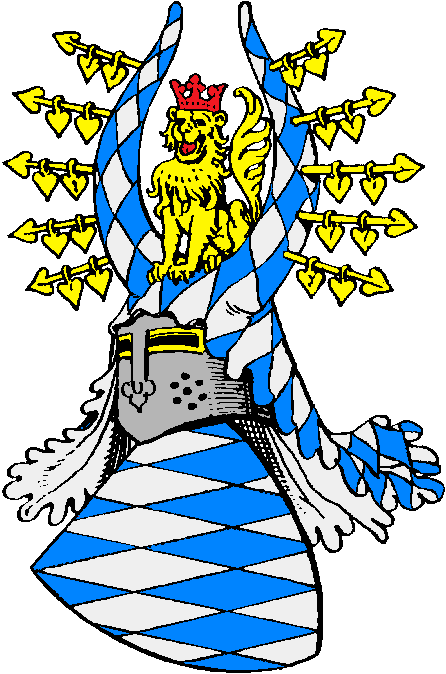 Stammwappen der bayerischen Herzöge aus dem Hause Wittelsbach (um 1300)